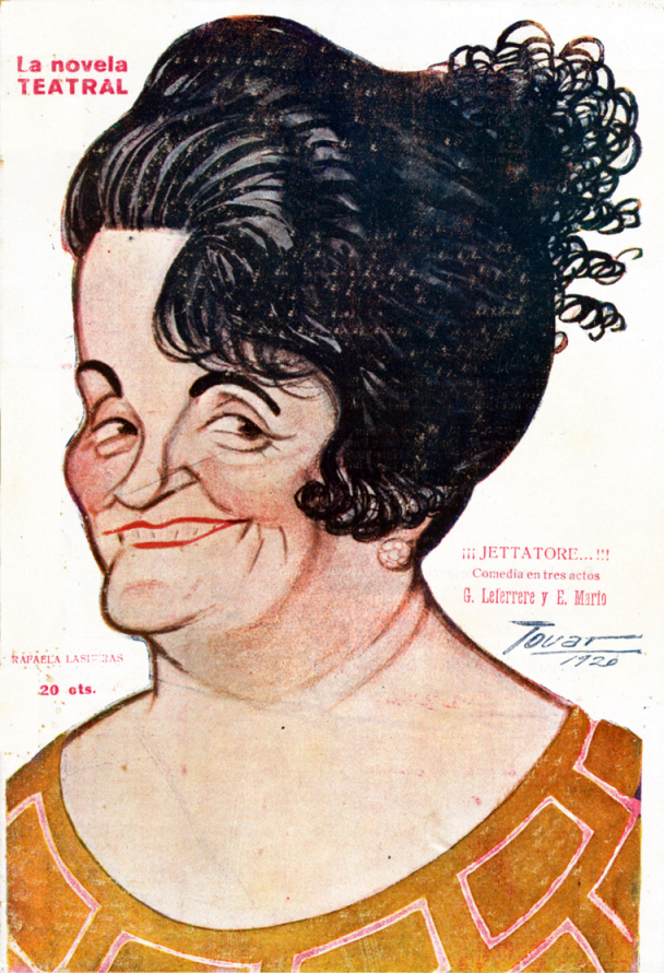 Rafaela Lasheras.